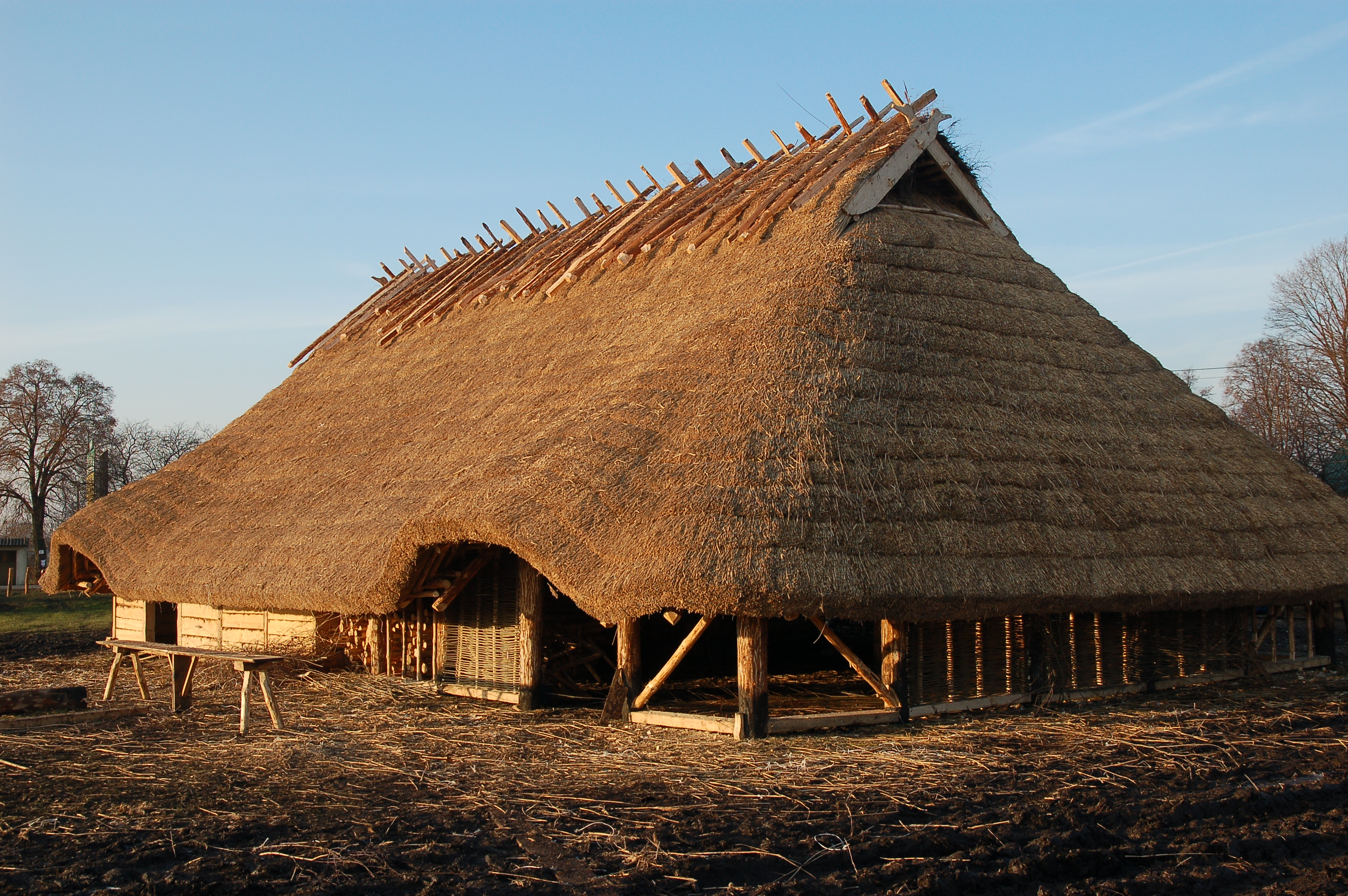 Gocki długi dom w Masłomęczu, zarówno pod względem rozmiarów, położenia według kierunków świata oraz konstrukcji dwóch głównych części, zaprojektowany i wykonany został w oparciu o wyniki badań archeologicznych w Hrubieszowie-Podgórzu.